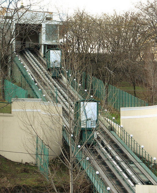 Одесский фуникулер